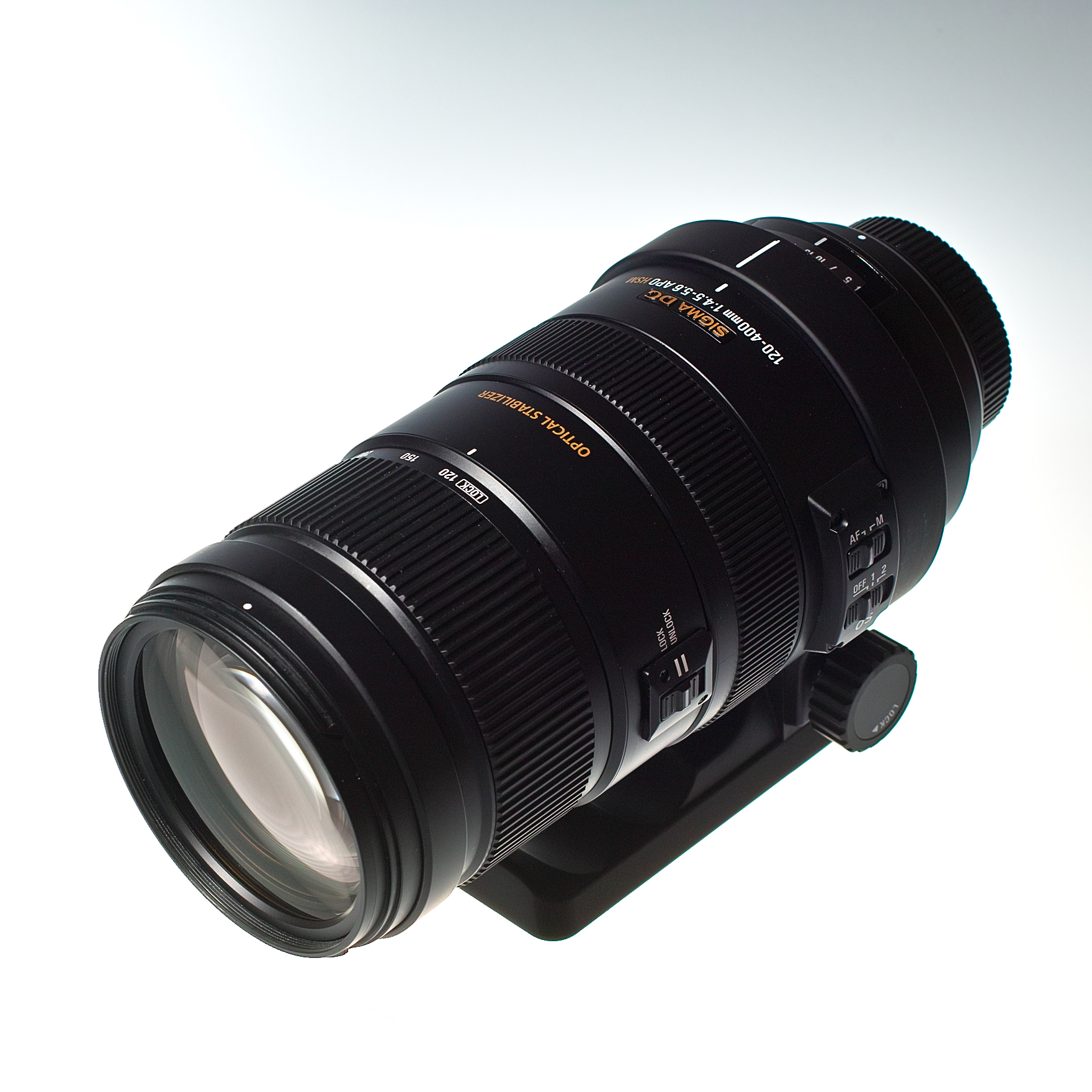 Sigma 120-400mm f/4.5-5.6 APO DG OS HSM